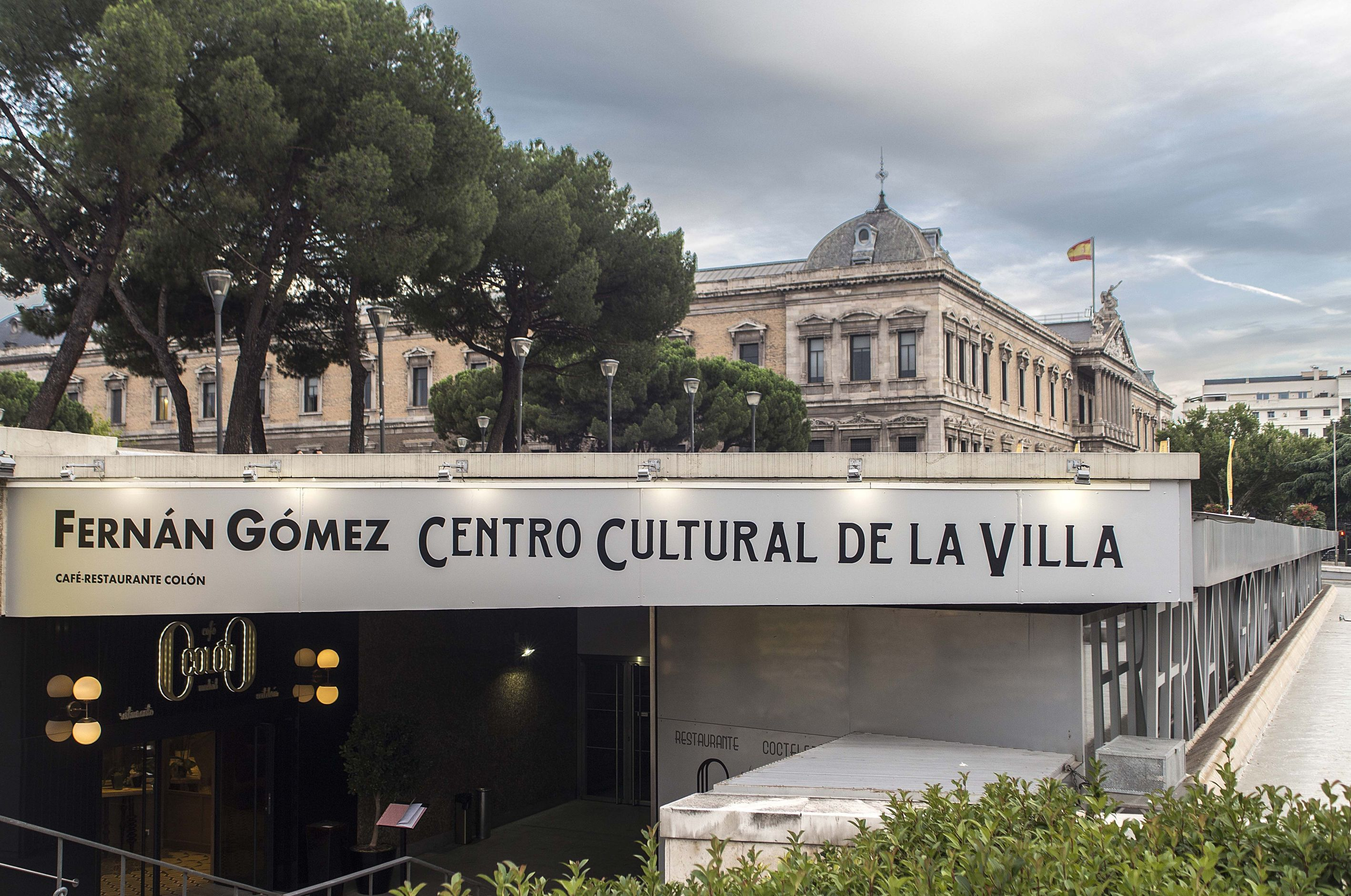 El centro fue inaugurado el 15 de mayo de 1977, desde entonces, por sus tres salas, Sala Guirau, Sala Jardiel Poncela y la Sala de Exposiciones han pasado obras de teatro, tanto de clásicos como de autores contemporáneos, zarzuela, conciertos, conferencias, danza, teatro para bebés, charlas y exposiciones de fotografías, esculturas o de figuras de relevancia en el mundo de la cultura. Con motivo del fallecimiento del actor y escritor Fernando Fernán Gómez, el centro pasó a llamarse Teatro Fernán Gómez-Centro de Arte, nombre que volvió a cambiar en 2014, bautizándole finalmente como Fernán Gómez. Centro Cultural de la Villa.